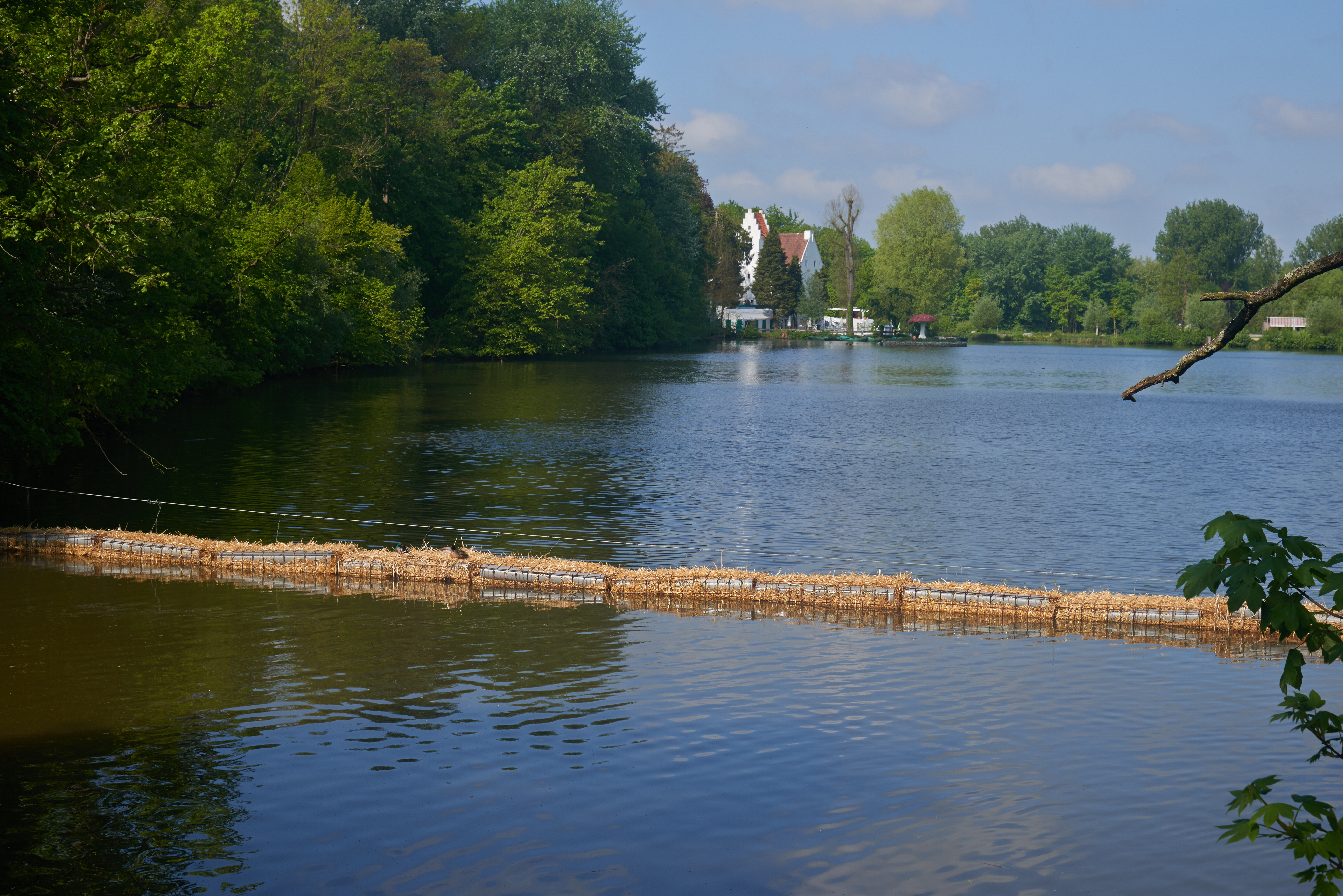 Balen van gerstestro dat via verrotting van het stro de algengroei moet belemmeren in de 'Huisvijver' bij Zoet Water, Oud-Heverlee, België